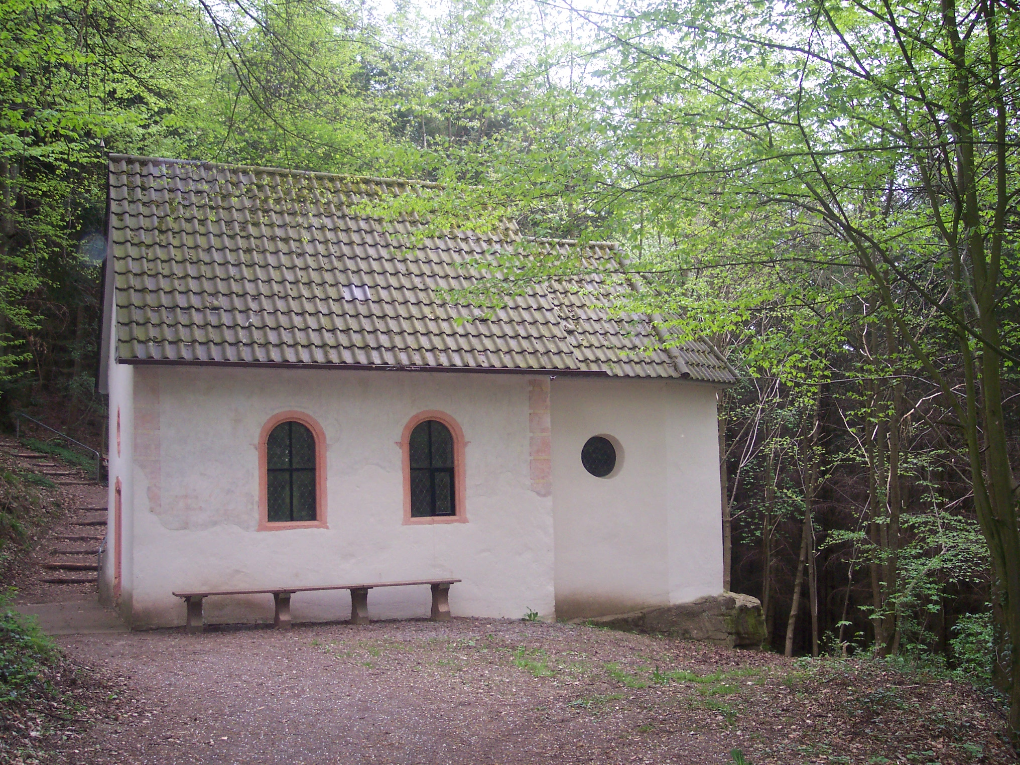 Auf dem Bild ist die Waldkapelle von Hamberg (Gemeinde Neuhausen im Enzkeis) zu sehen